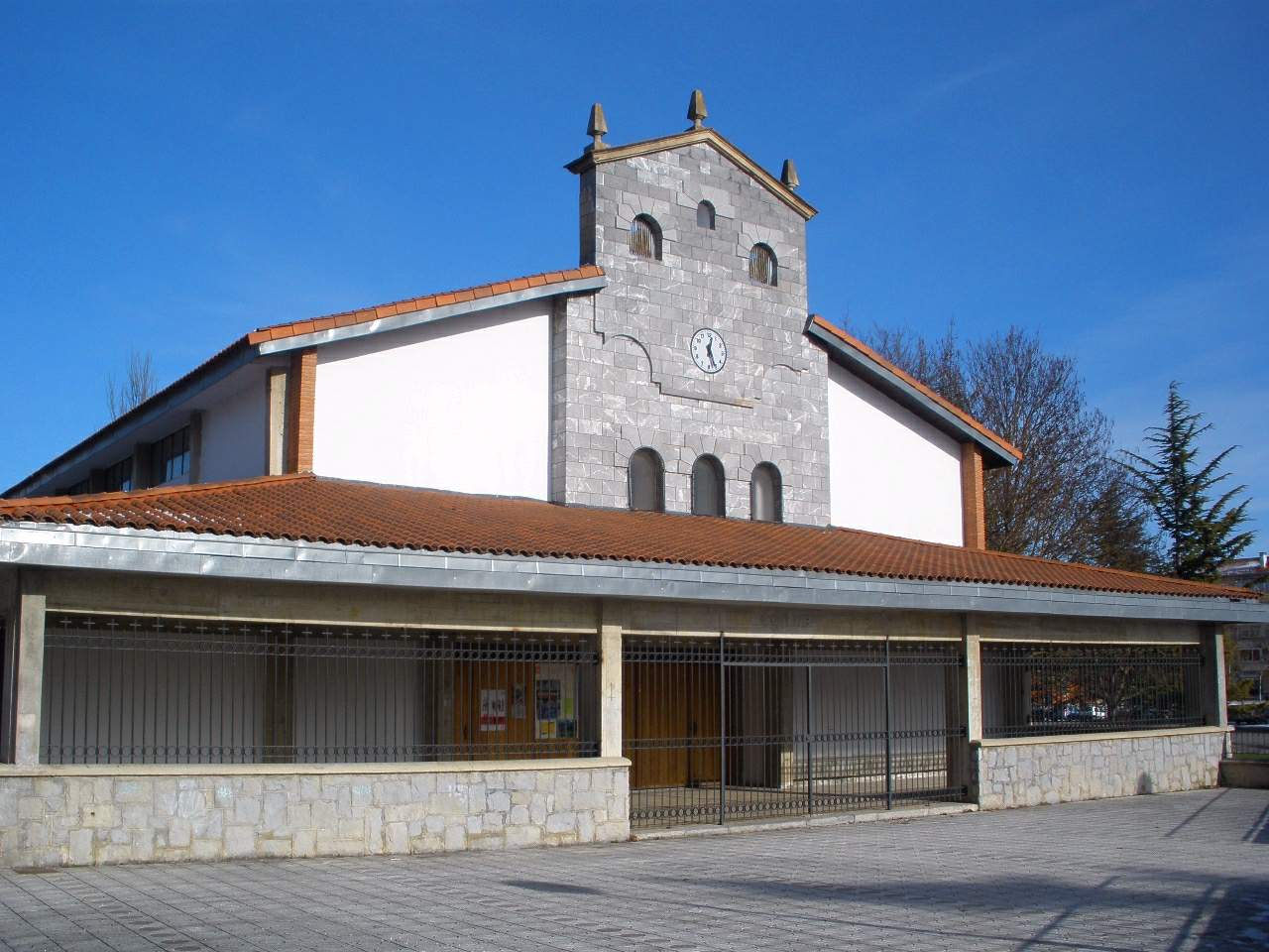 Vitoria, barrio de Abetxuko, parroquia de San Jose Obrero